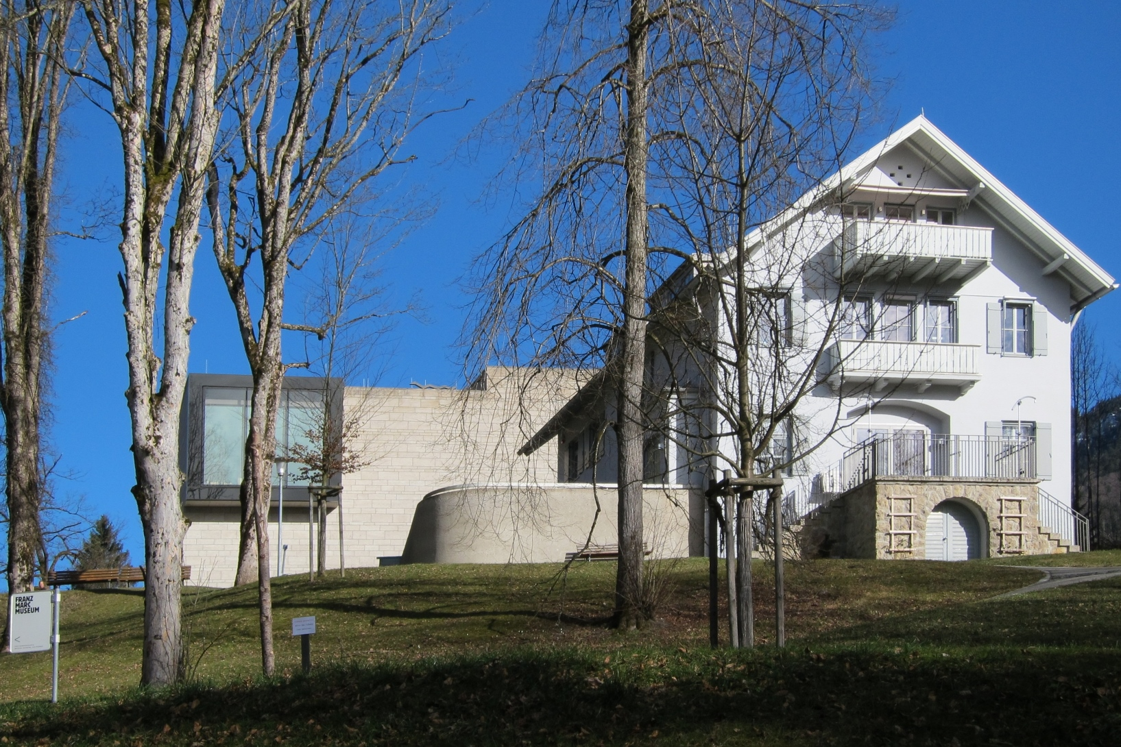 Franz-Marc-Museum mit Erweiterungsbau